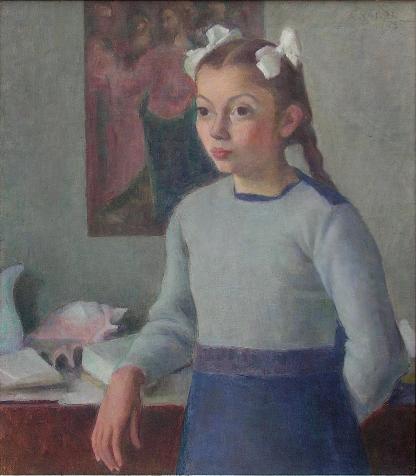 foto del dipinto di Antonio Nardi "Bambina con le trecce" del 1948.